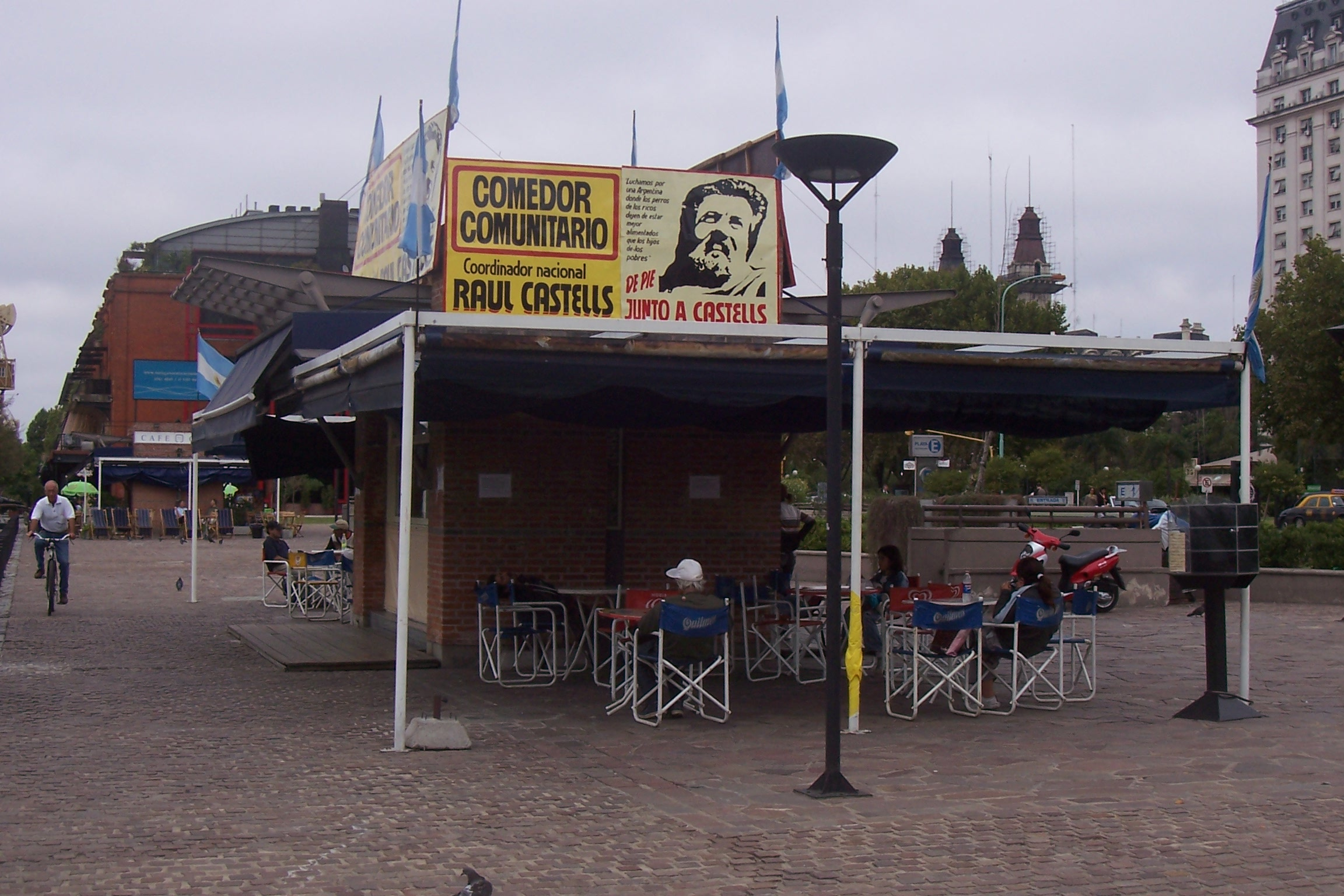 El comedor de Raúl Castells en el barrio porteño de Puerto Madero, Argentina.